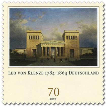 Briefmarke der Deutschen Post AG, 225. Geburtstag von Leo von Klenze (1784–1864)